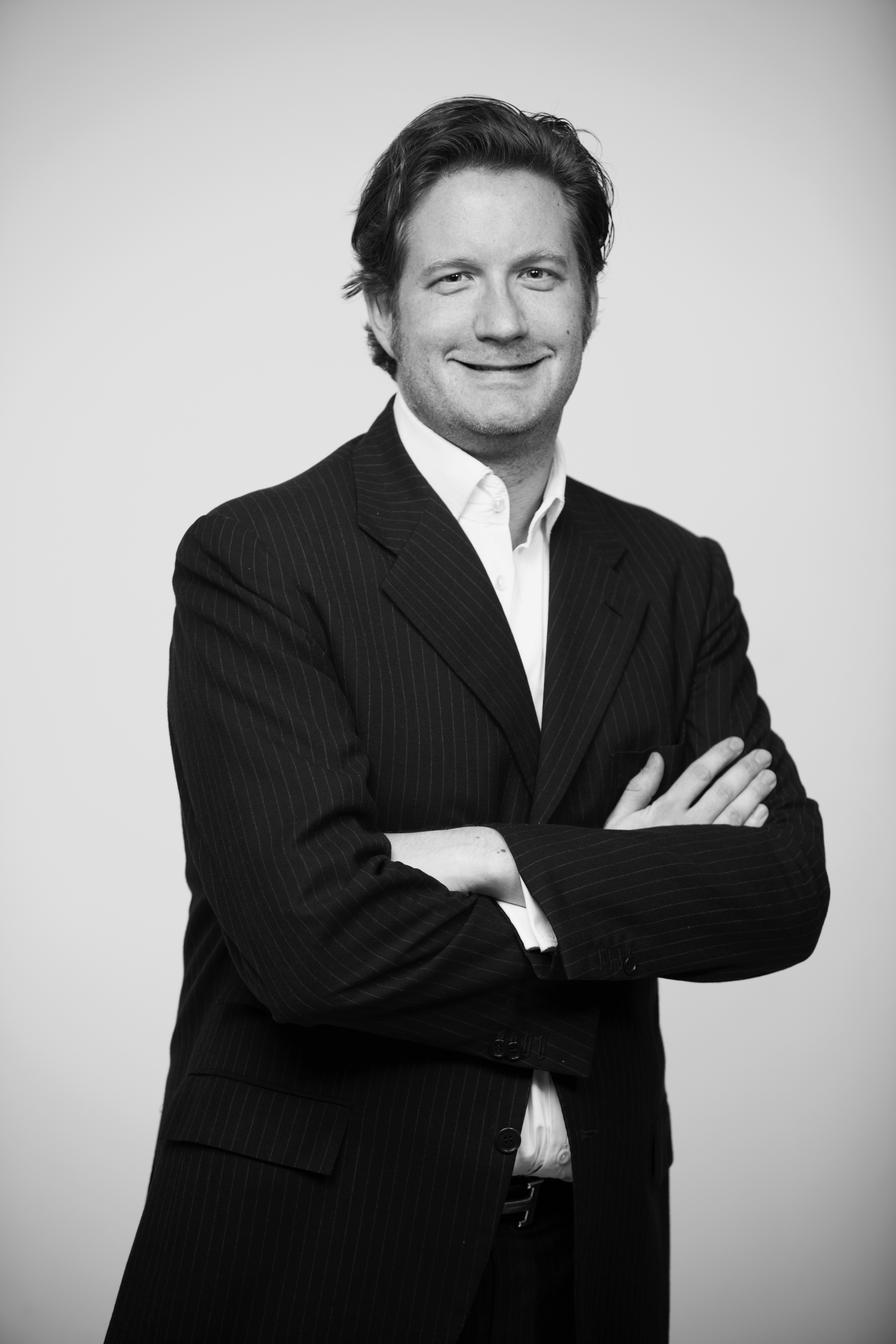 Der deutsche Filmproduzent David Groenewold.